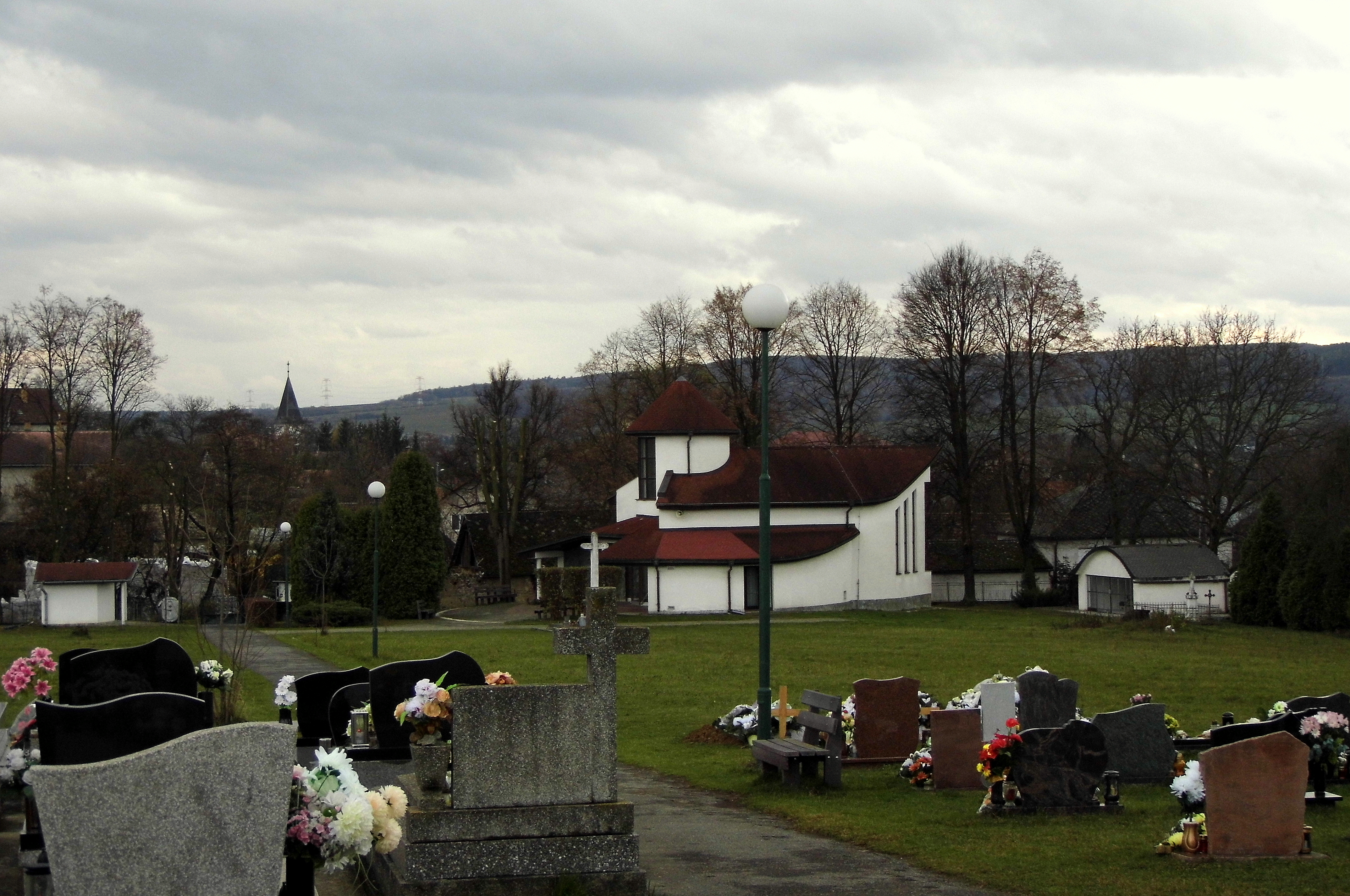 Sv. Cirila a Metoda